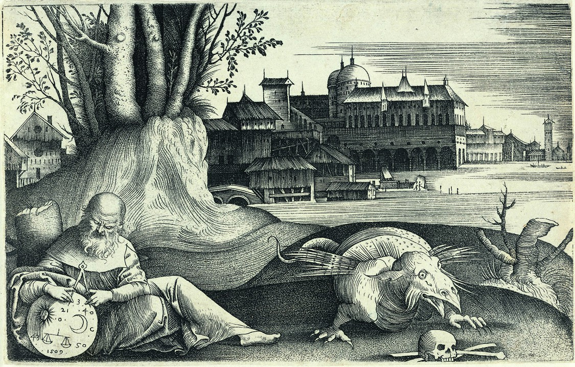 Giulio campagnola, l'astrologo